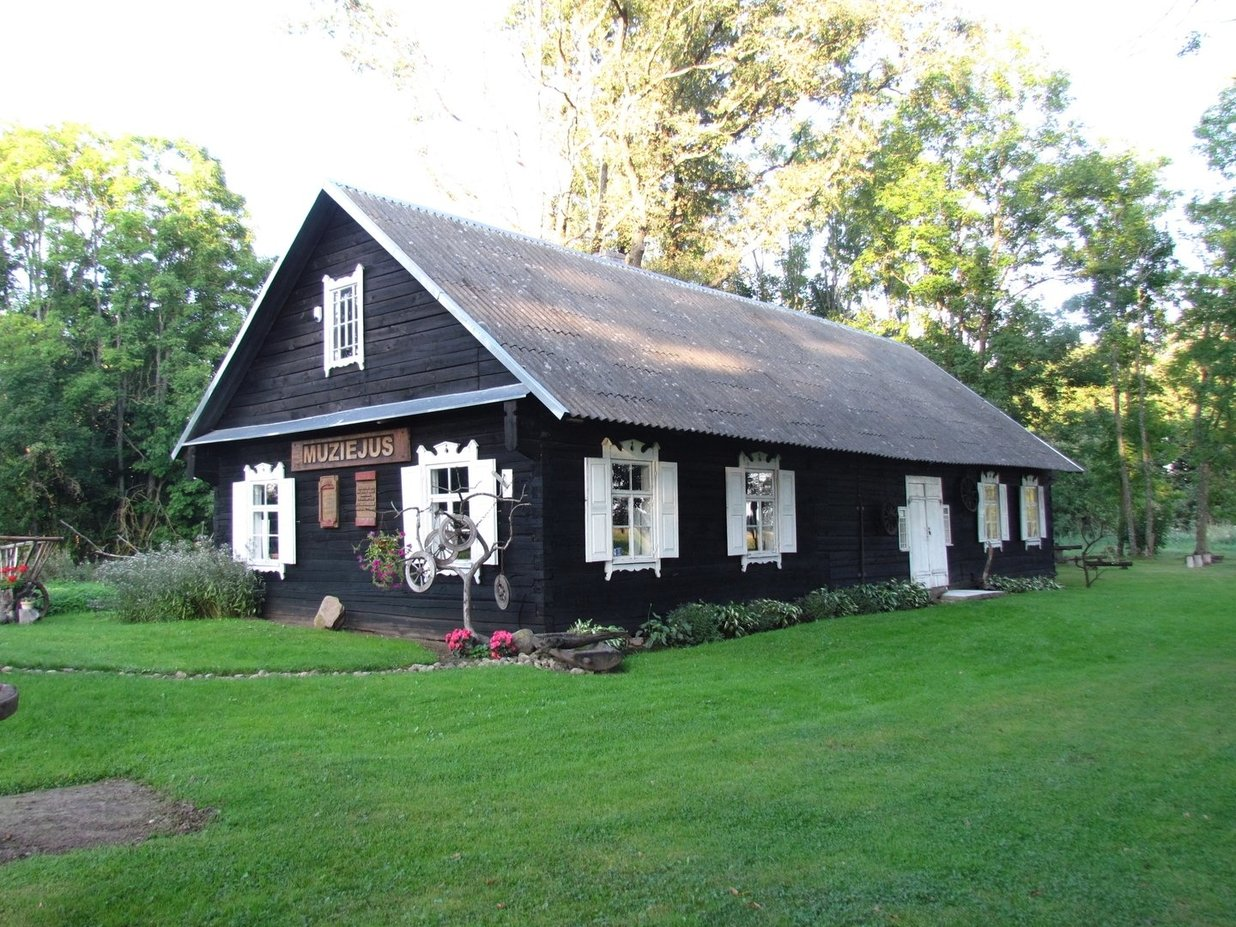 Laukminiškių kaimo muziejus